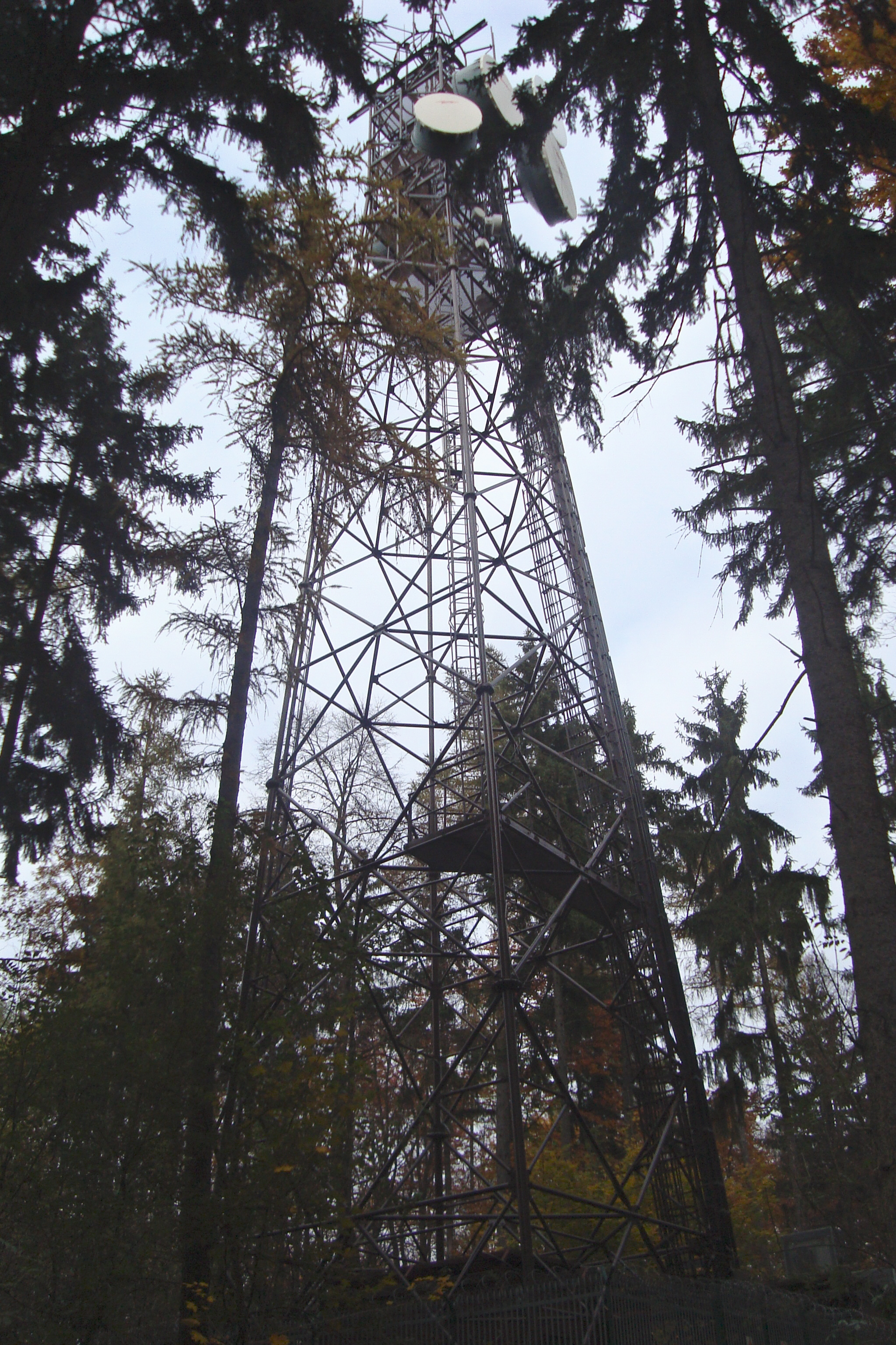 Komunikační vysílač mobilních telefonů v Podkomorských lesích umístěný na vrcholu Lipový vrch 478 m.n.m.